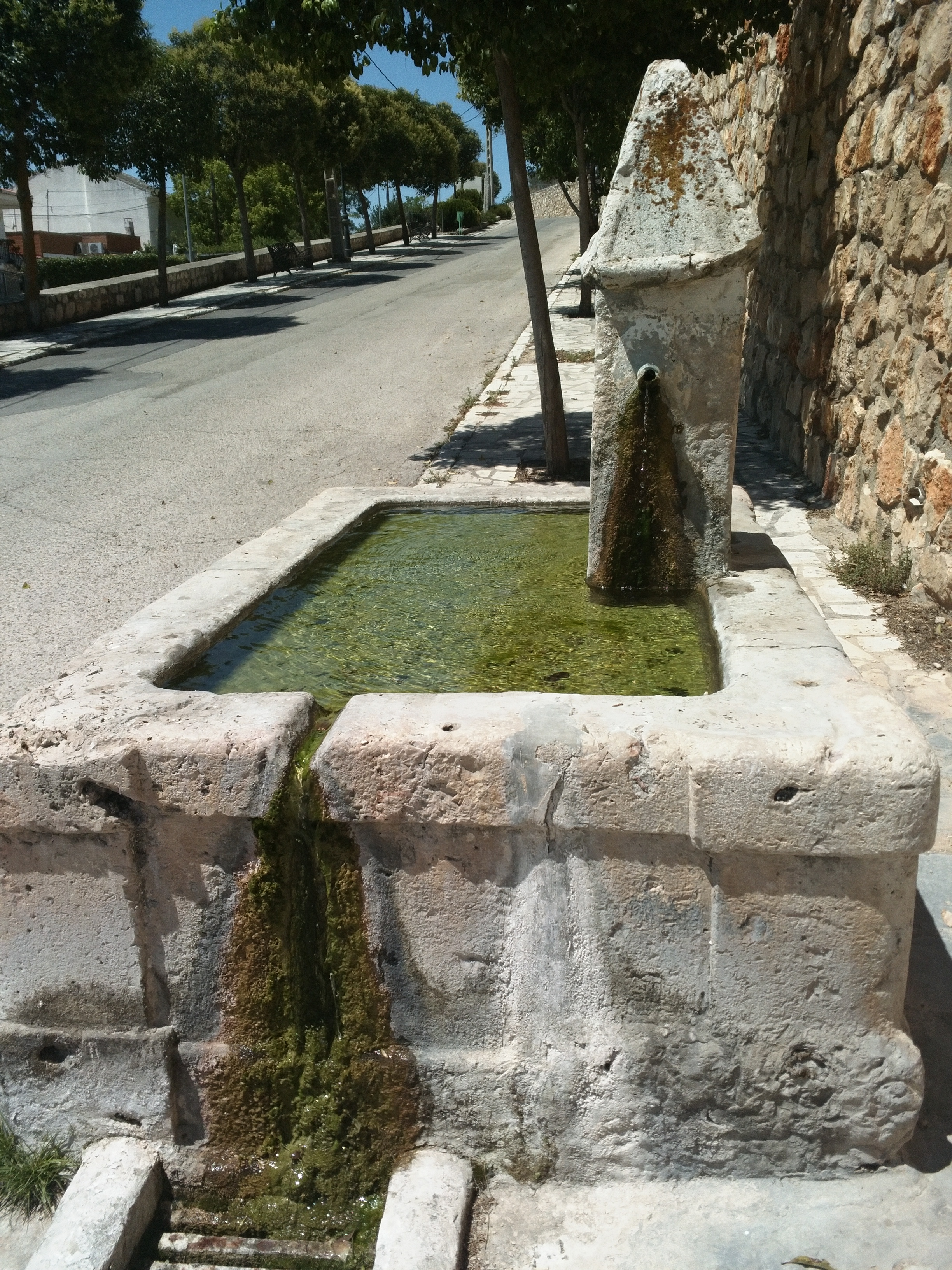 Fuente del Barranquillo en Orusco de Tajuña, vista lateral